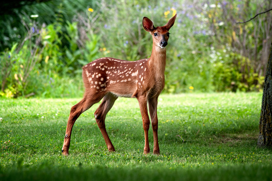 Petite Biche